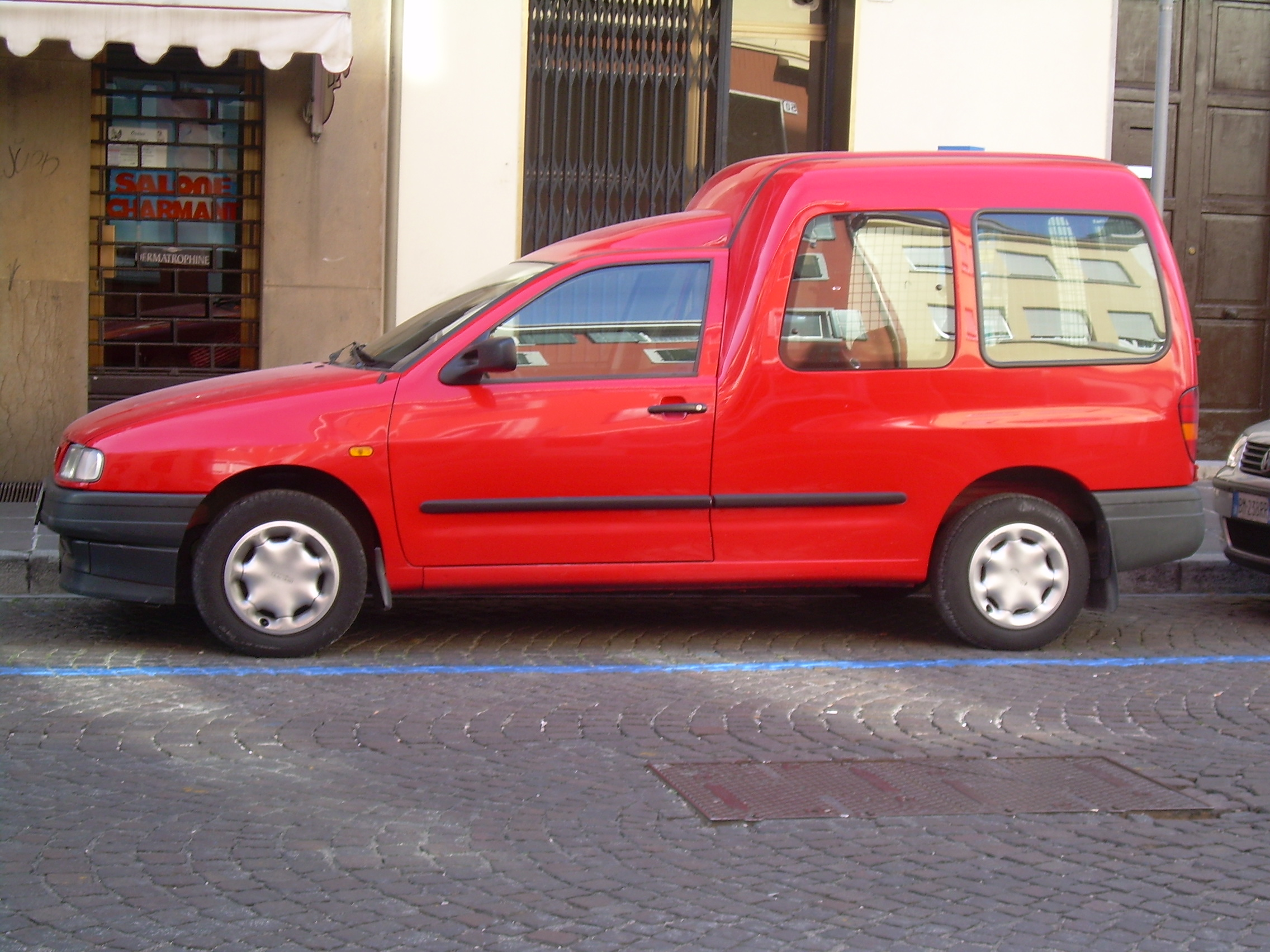 Autore:Powering Descrizione:SEAT Inca Licenza d'uso:PD-utene